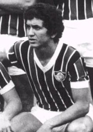 Lula ex-ponta esquerda